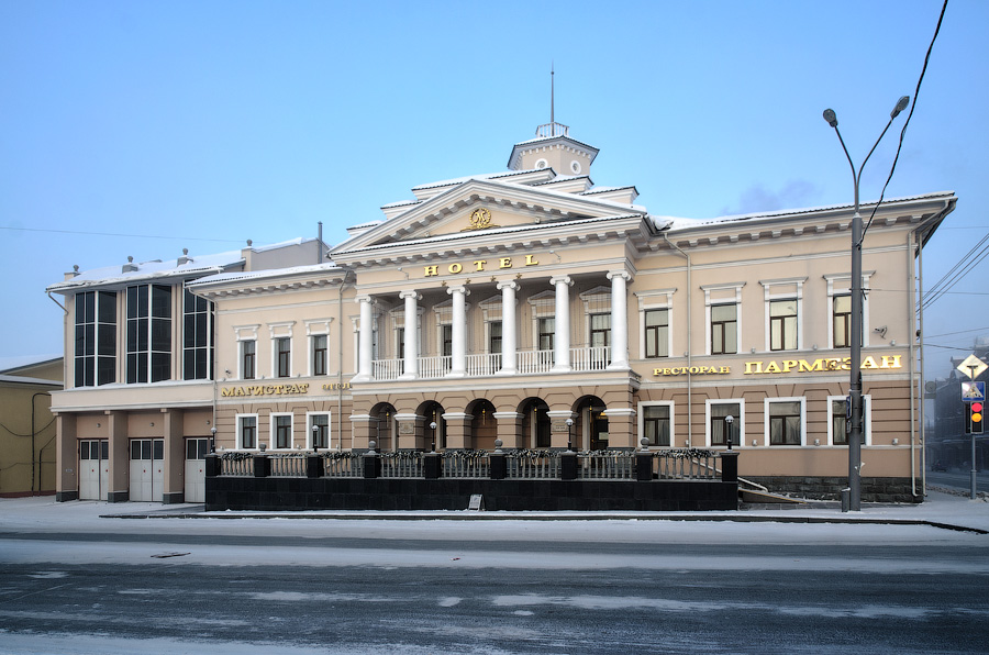 Магистрат (здание Мещанской Управы) (Томская область, Томск, Розы Люксембург улица, 2)